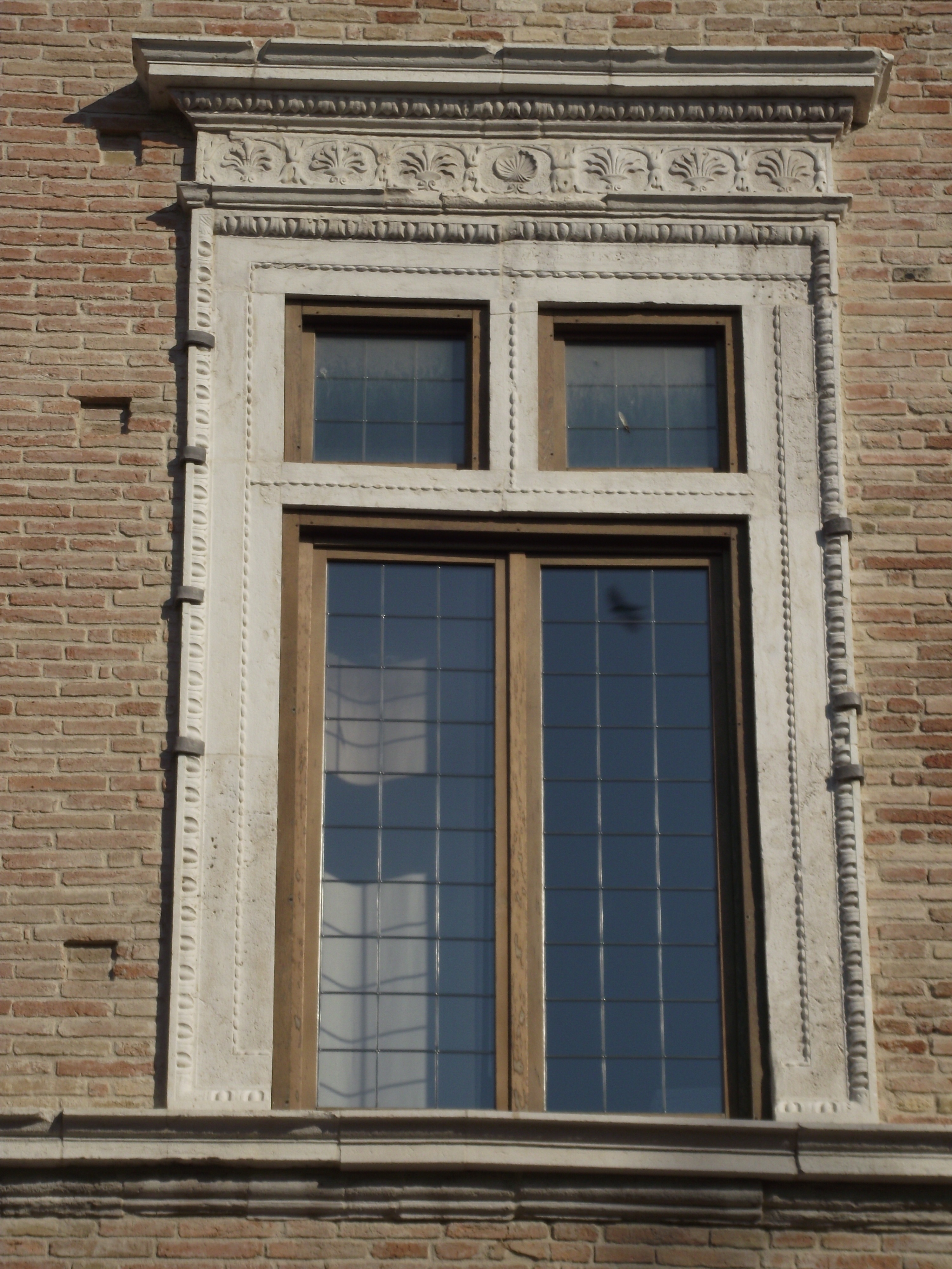 Jesi, Palazzo della Signoria, F.di G.Martini, 1486-98